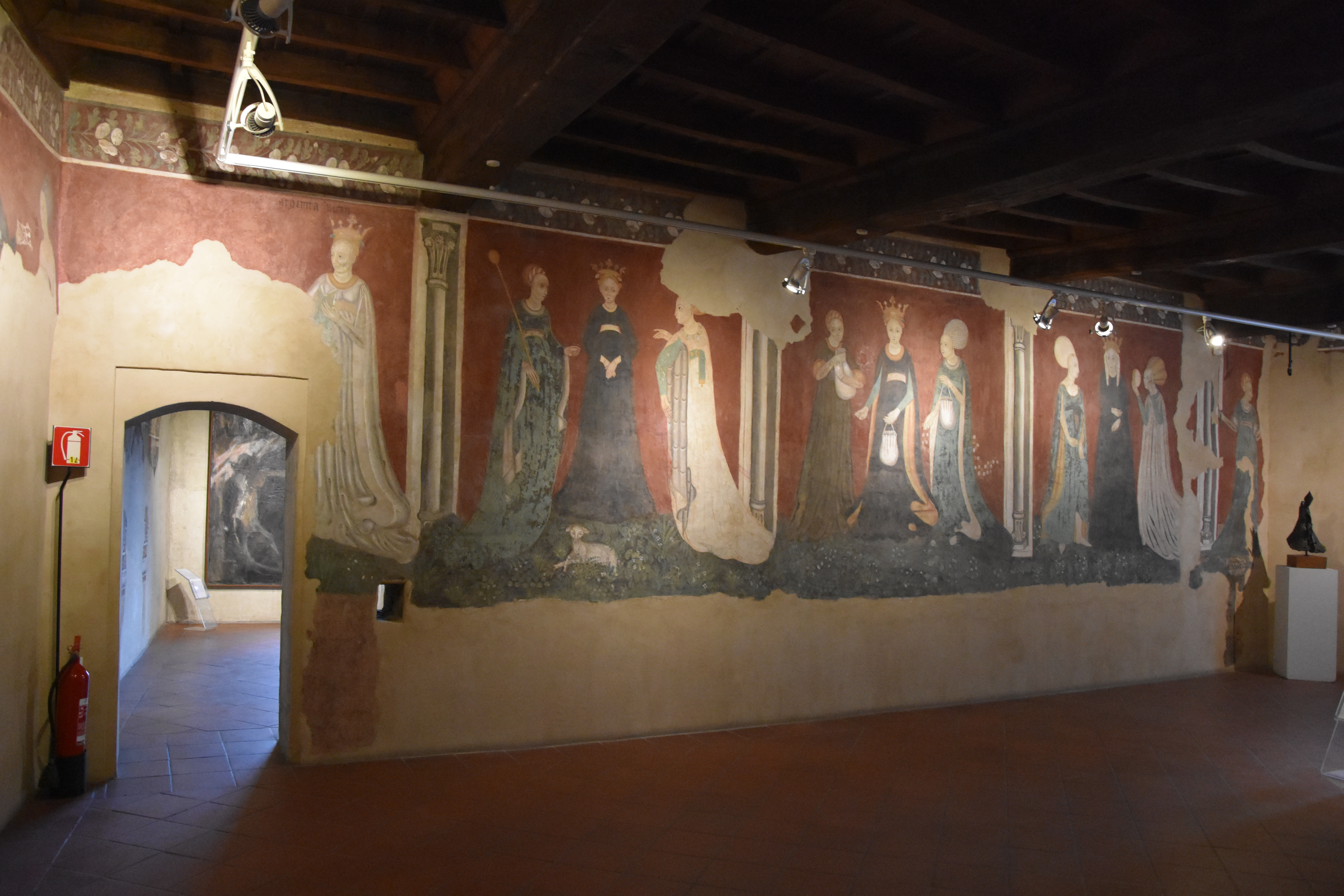 Affreschi tardo-gotici nella sala dei Vizi e delle Virtù, all'interno del castello Mantegazza-Panza a Masnago, Varese.